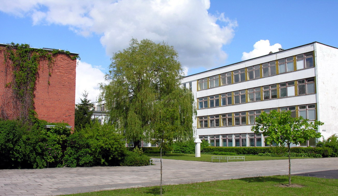 Mažeikių Gabijos gimnazija Foto: Algirdas, 2006 m. gegužės 30 d.